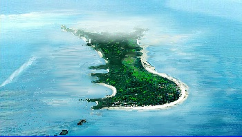 Bild der Insel Malapascua als Luftansicht